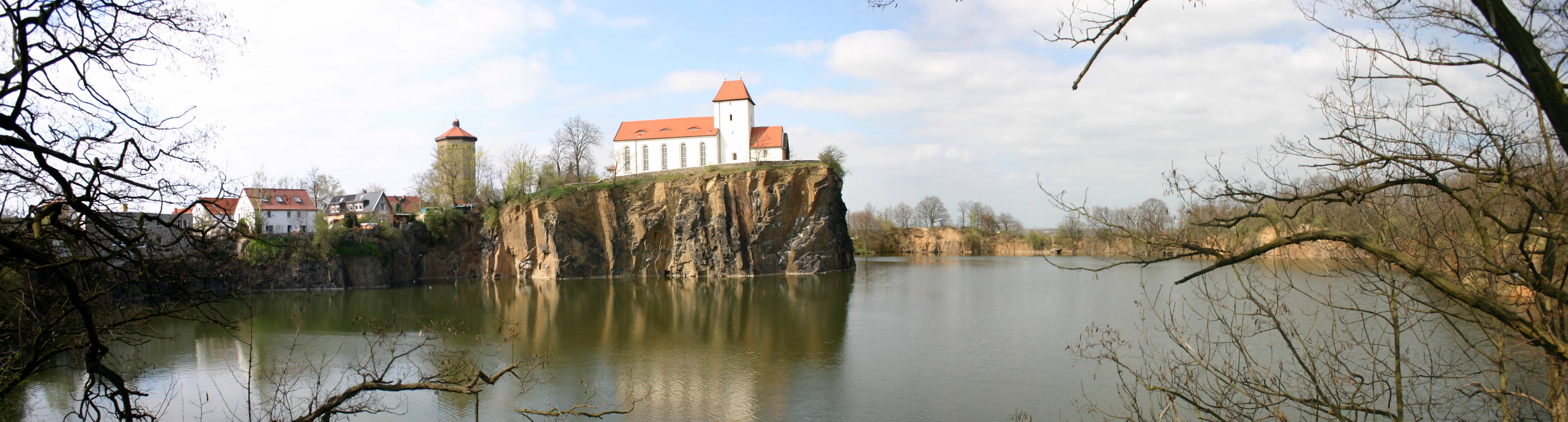 Beucha, Sachsen, Germany